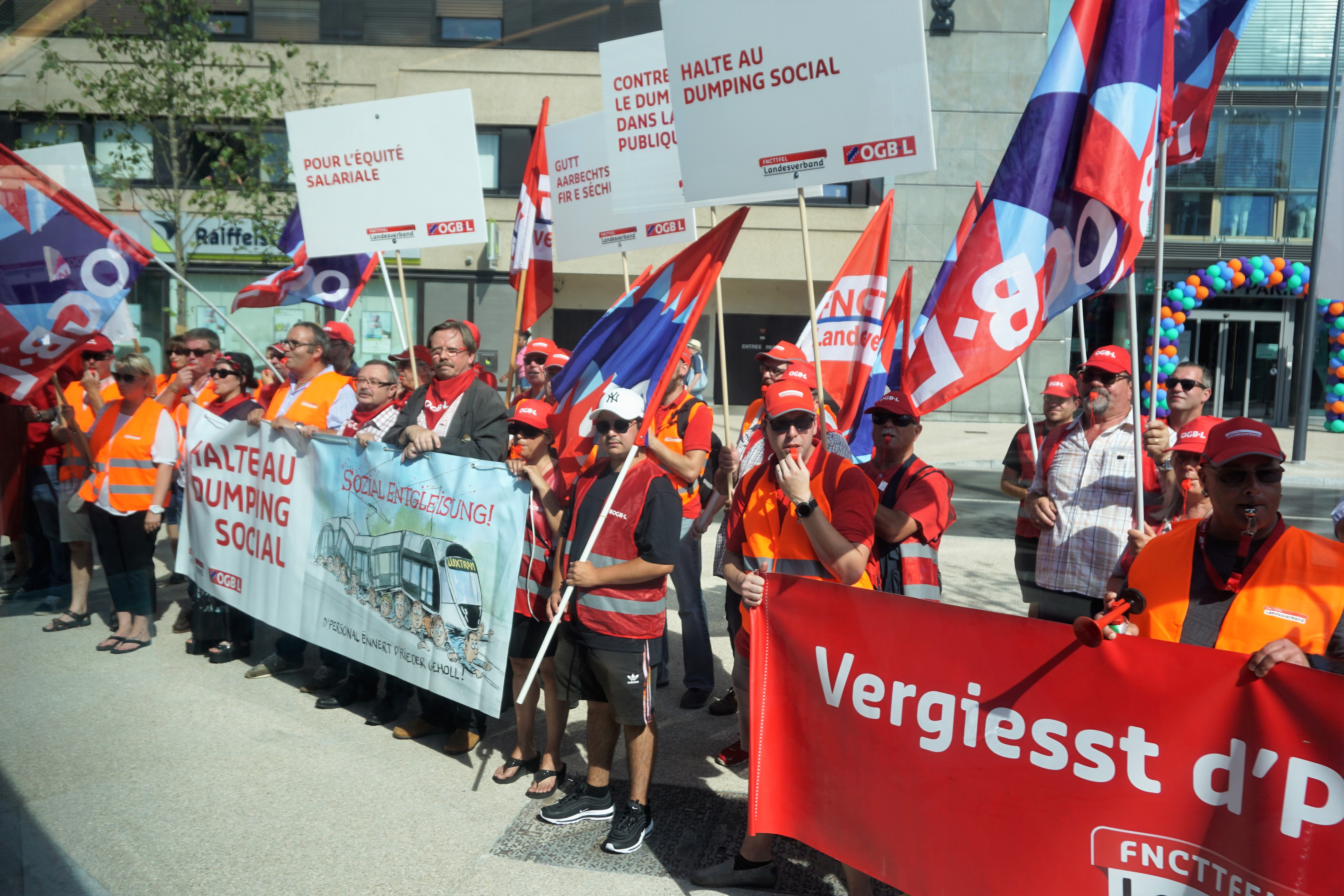 Inauguration de la 2e phase de la ligne de tramway à Luxembourg le 27 juillet 2018. Manifestation syndicale pour réclamer de meilleures conditions de travail pour le personnel de Luxtram.